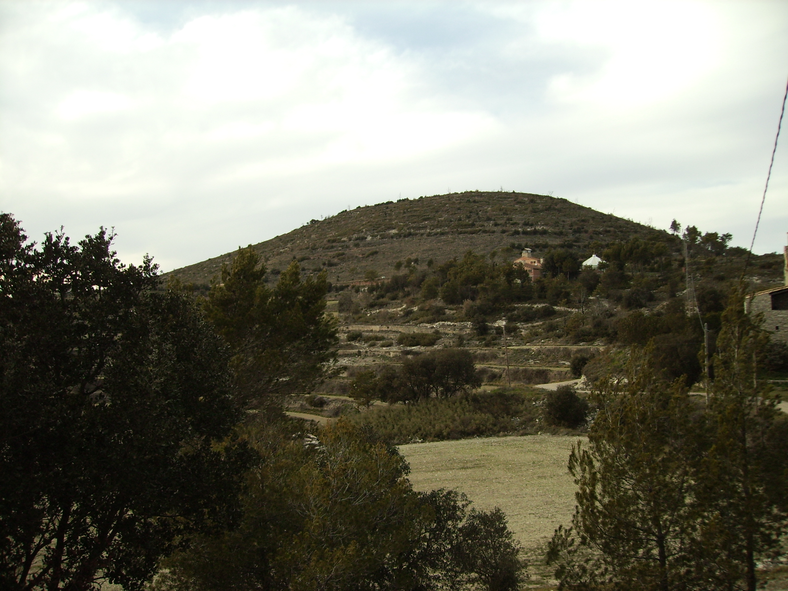 Image:Selves_18_febrer_2006_048.jpg Tossal de la Serra de Castelltallat ,cara sud, punt més alt d'aquesta serralada de la Catalunya central.